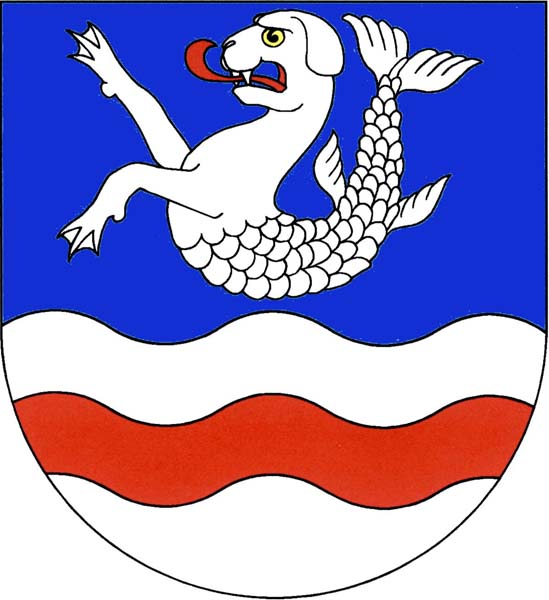 Znak obce Lukavice (okres Chrudim)